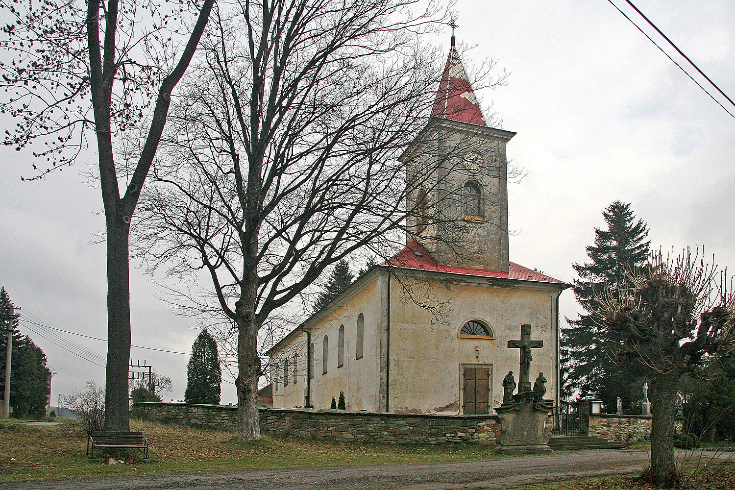 Kostel Svatého Jiří v Kunvaldu, district Ústí nad Orlicí autor: Prazak date: 21. 11. 2006